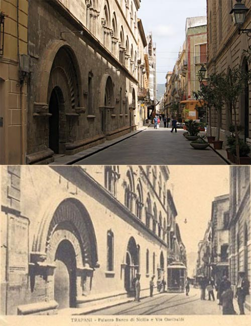 Via Garibaldi, Trapani, Sizilien. Vergleich 2010 mit erste Hälfte 20. Jahrhundert